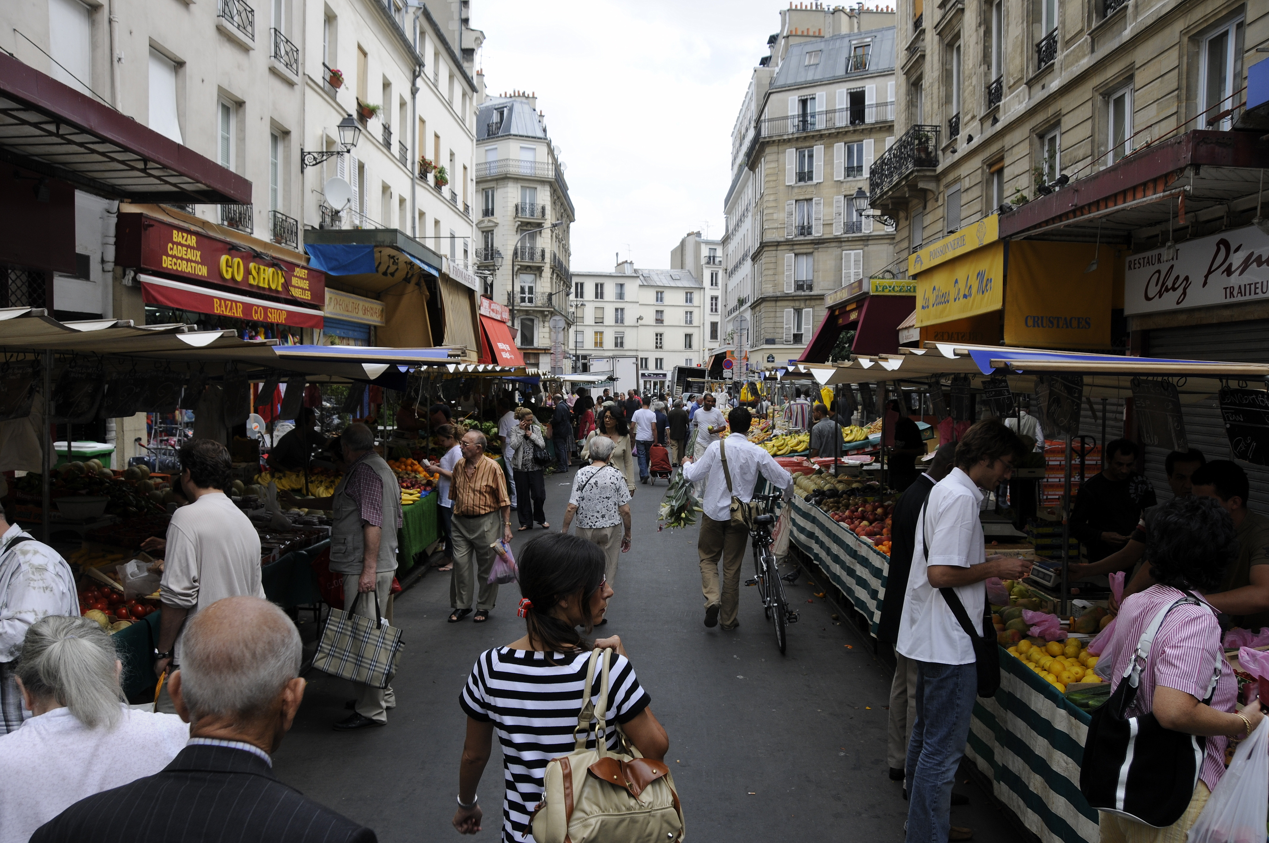 Le marché d'Aligre est un marché "public" situé sur la rue d'Aligre et la place d'Aligre, Paris